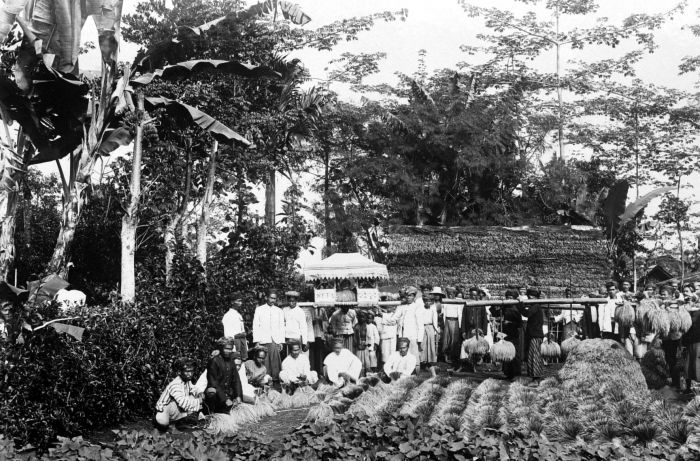 Repronegatief. Java mag dan sinds de zestiende eeuw grotendeels islamitisch zijn, veel belangrijke gebeurtenissen waren nog in de twintigste eeuw omgeven door rituelen die van voor de komst van de islam dateren. Dit geldt voor alles wat met de landbouw te maken heeft en voor de levenscyclus van de mens (geboorte, besnijdenis, huwelijk, dood). Vooral de teelt van rijst, het meest populaire voedselgewas op Java, was omgeven met vele ceremoniële activiteiten. (P. Boomgaard, 2001). Oogstfeest ter ere van Iboe-paré, de rijstgodin, Karangtengah